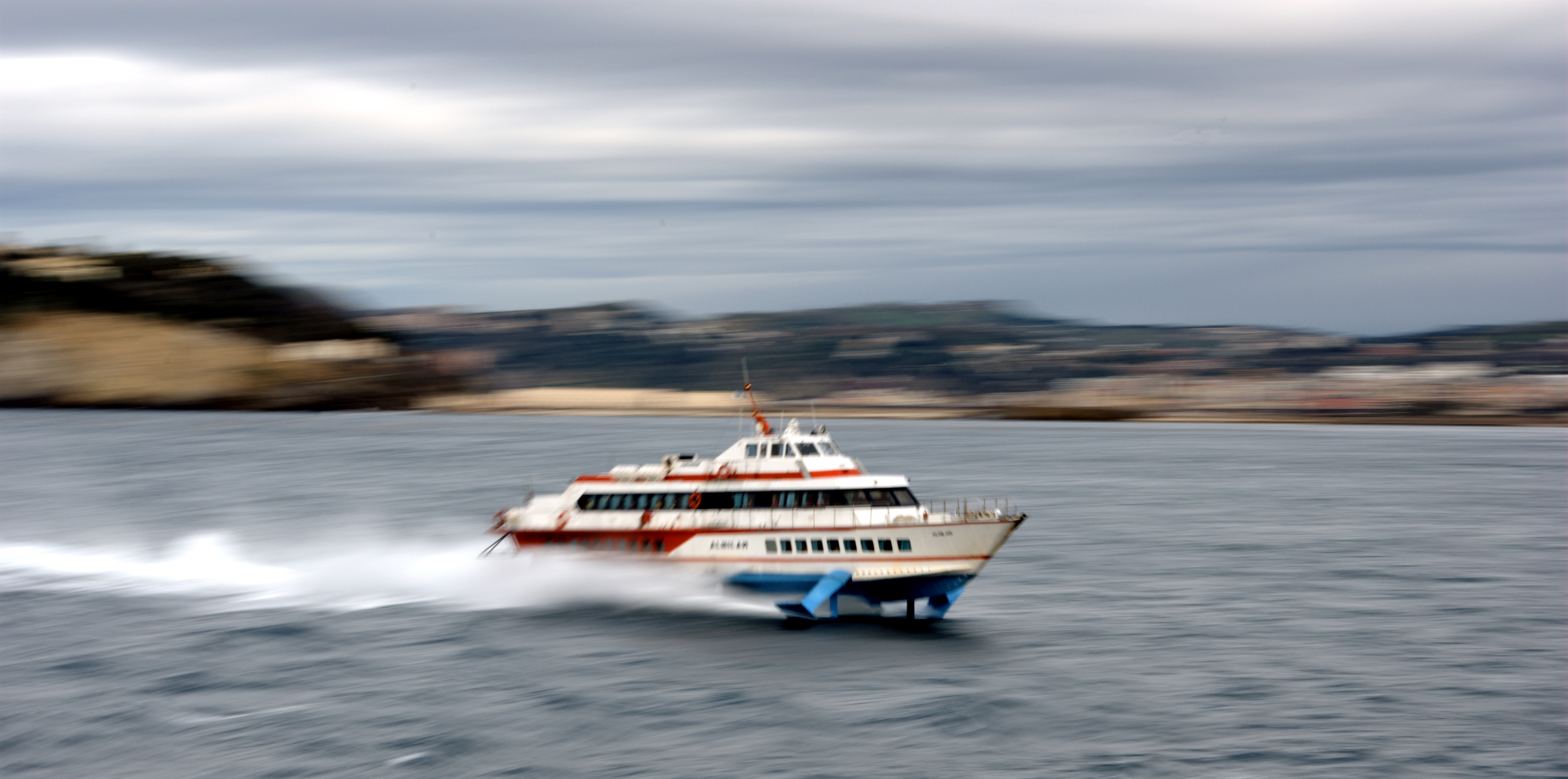 Aliscafo della compagnia Caremar partito da Ischia e diretto a Napoli. Autore foto: Roberto De Martino